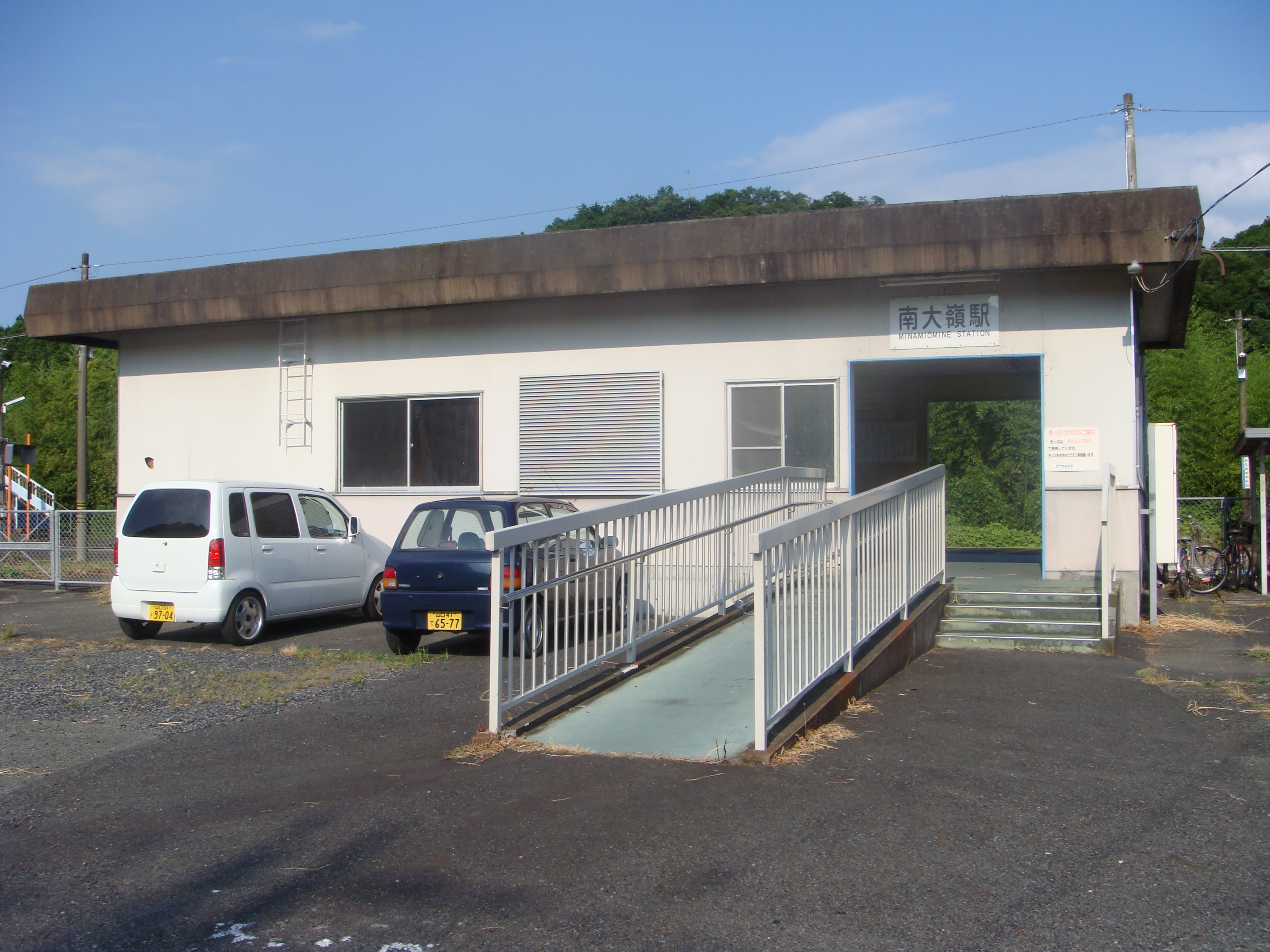 南大嶺駅舎(2008.07.26に投稿者が撮影)